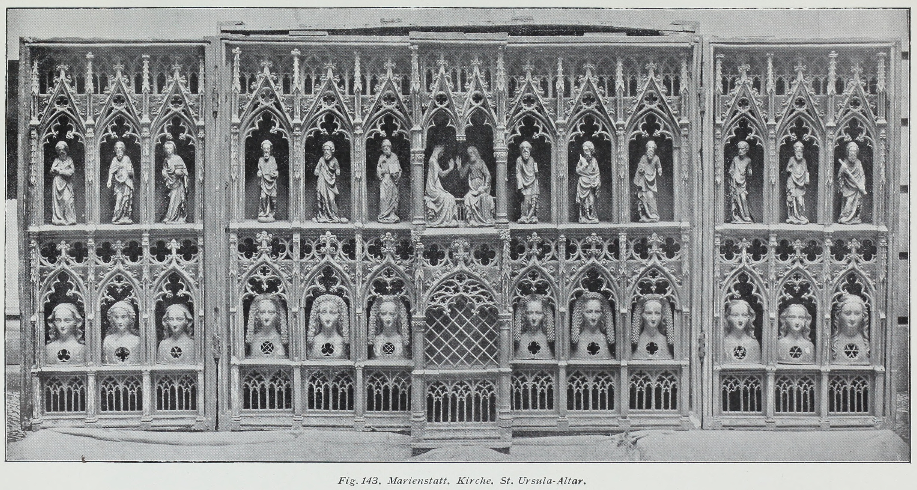 Marienstatt Kirche St Ursula-Altar This is a photograph of an architectural monument.